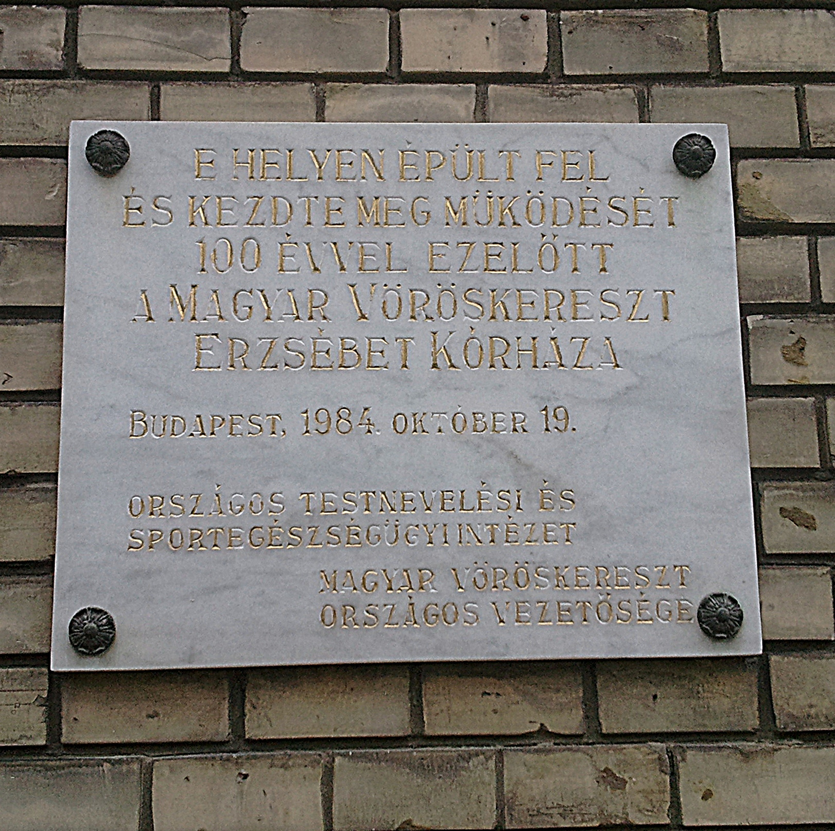 A Magyar Vöröskereszt Erzsébet Kórházának emléktáblája a "Sportkórházban". (Országos Sportegészségügyi Intézet)